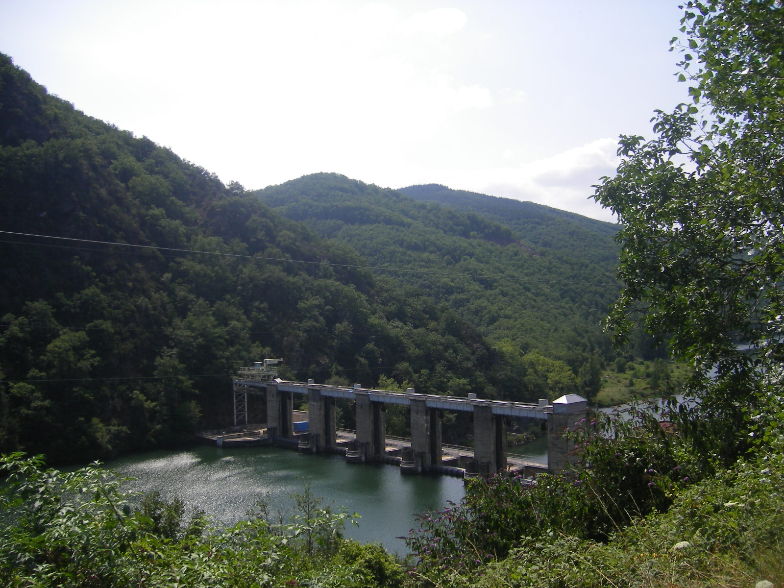 Barrage de la Jourdanie on the Tarn river (commune Broquiès)